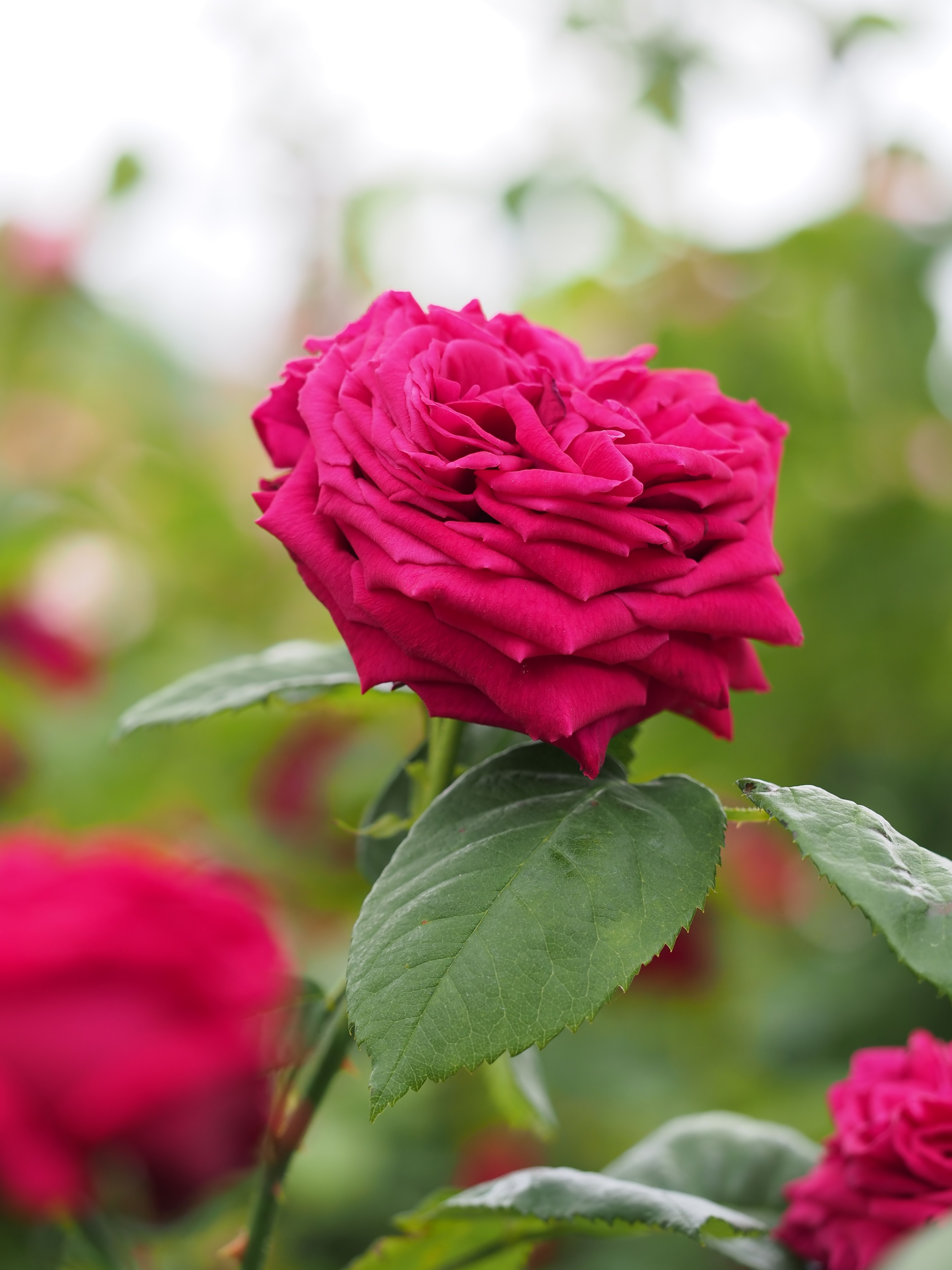 Rose, Éclair, バラ, エクレール, Old rose(HP) オールドローズ France フランス Lacharme 1883